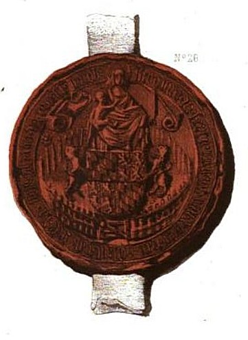 Jacqueline de Hainaut